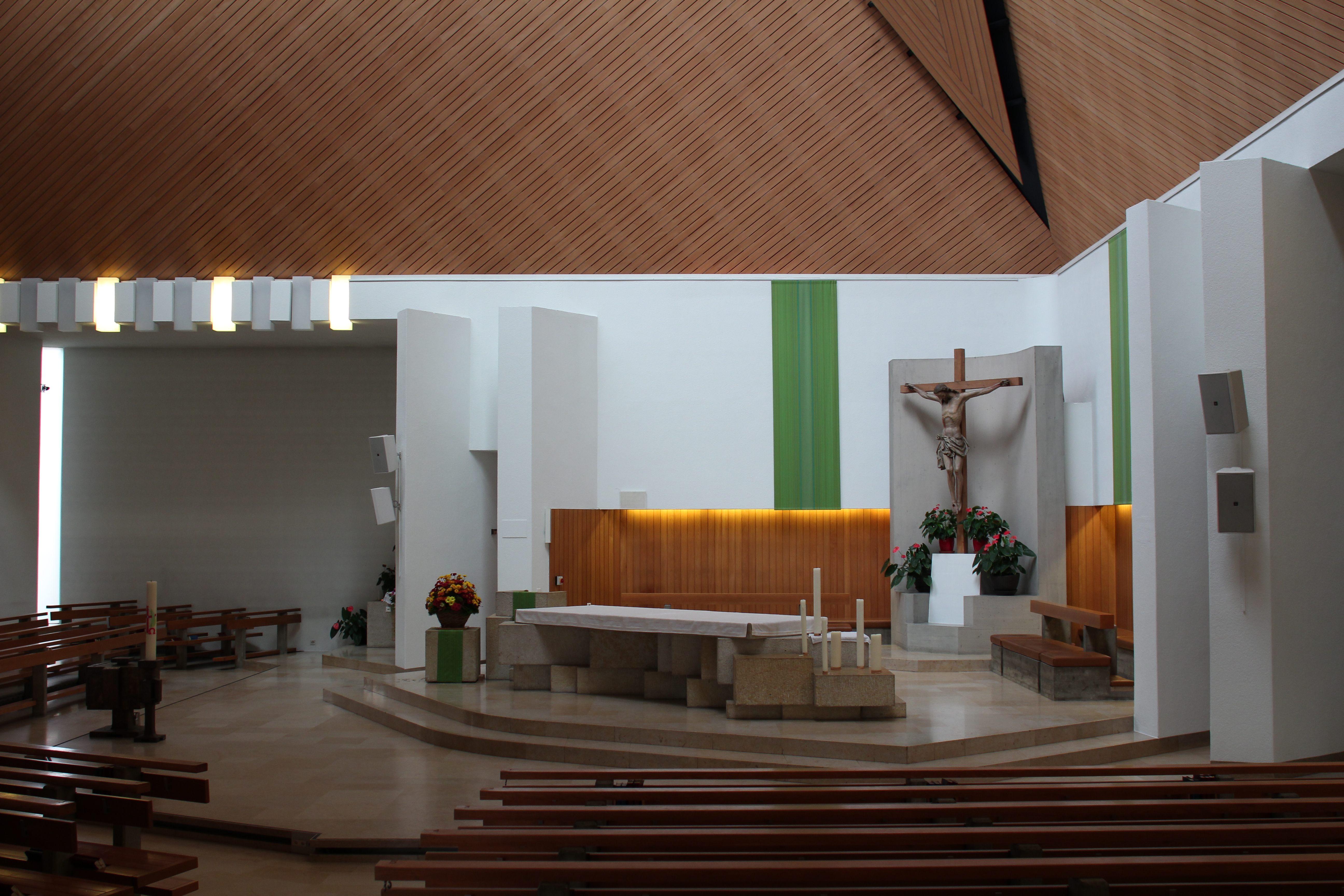 Römisch-katholische Pfarrkirche St. Andreas Uster, Altarinsel